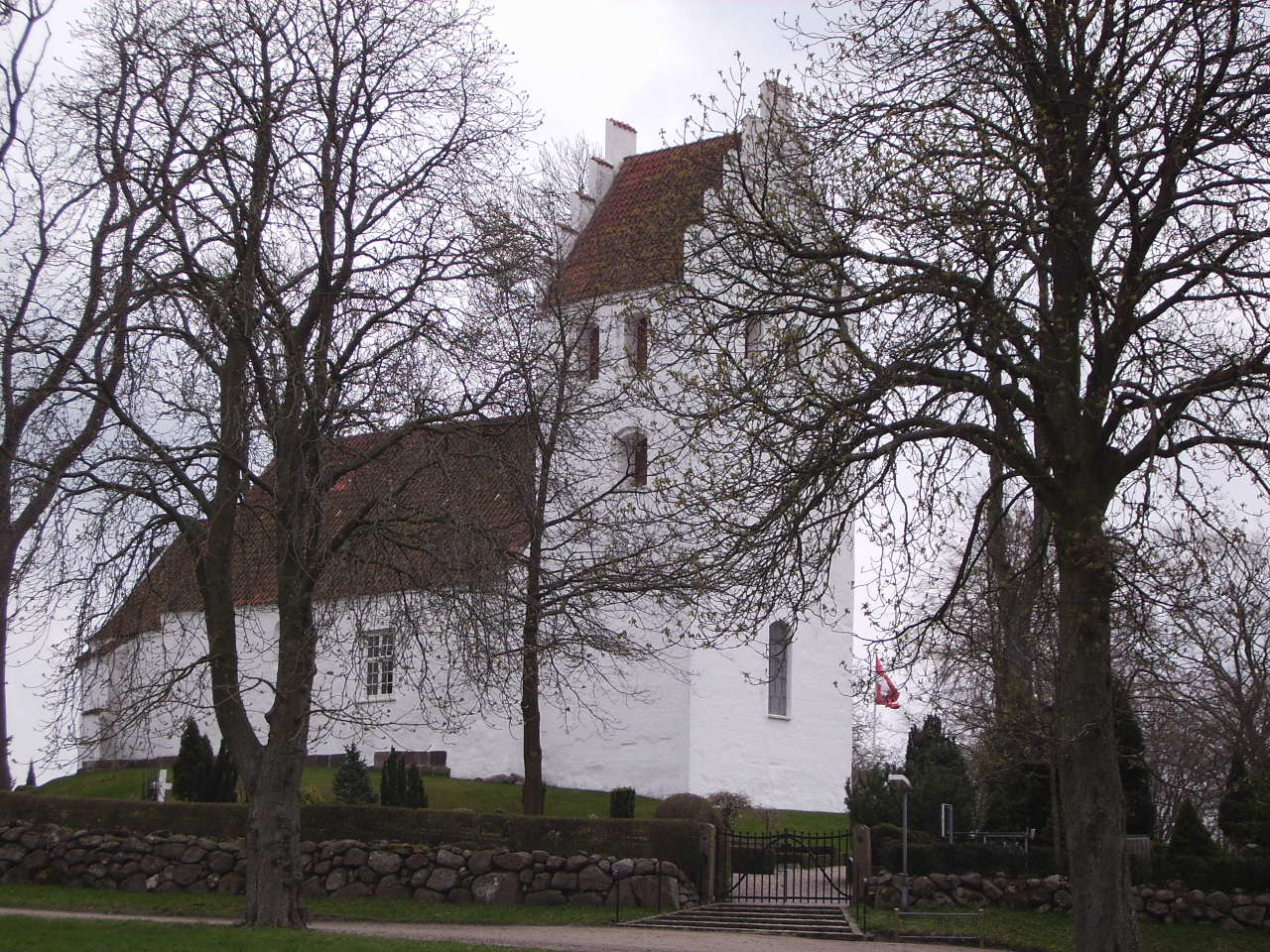 Stenløse Kirke, Stenløse Sogn, Odense Herred, Odense Amt, Denmark (Danish Church) Date: 30.04.2006 Photographed by Søren Møller